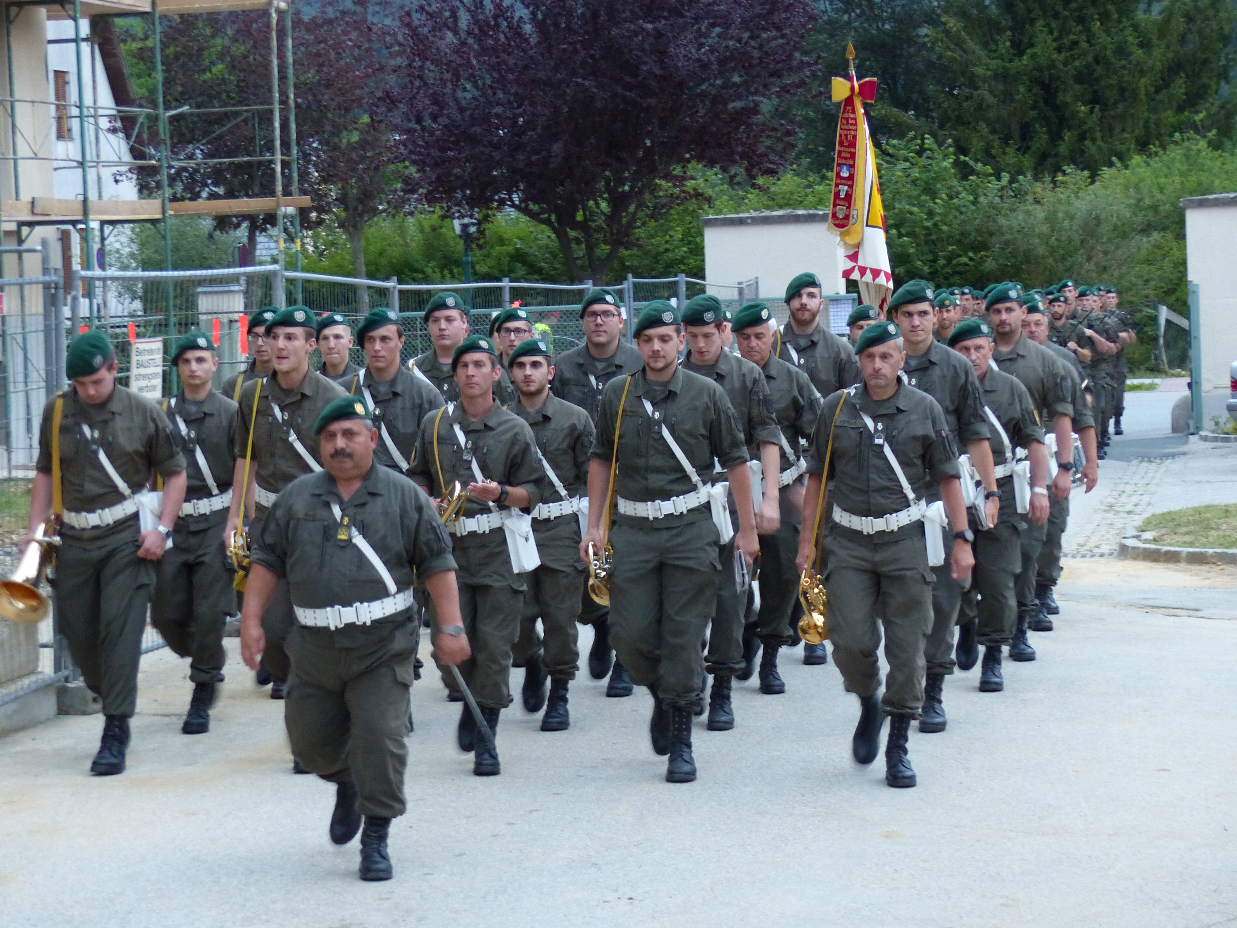 Militärmusik Burgenland in Pinkafeld anlässlich der Aufführung eines Großen Zapfenstreiches auf dem Gelände der ehemaligen Turba-Kaserne.